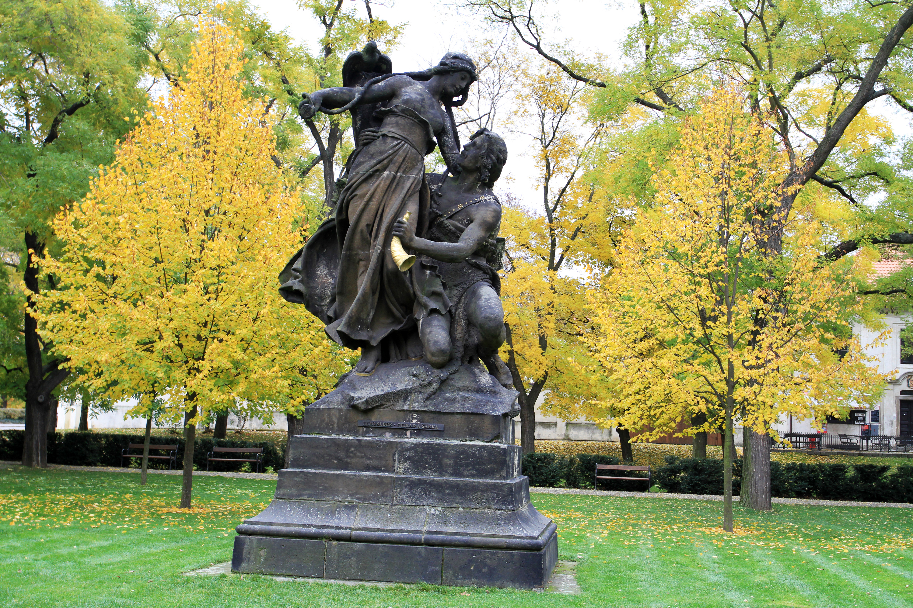 Pevnost Vyšehrad, Praha 2-Vyšehrad, Soběslavova 14/1, V pevnosti 16/2, 35/11, K rotundě 16/3, 81/6, 82/8, 90/12, 91/14, 92/16, 100/10, Štulcova 89/1, 102/2, 69/3